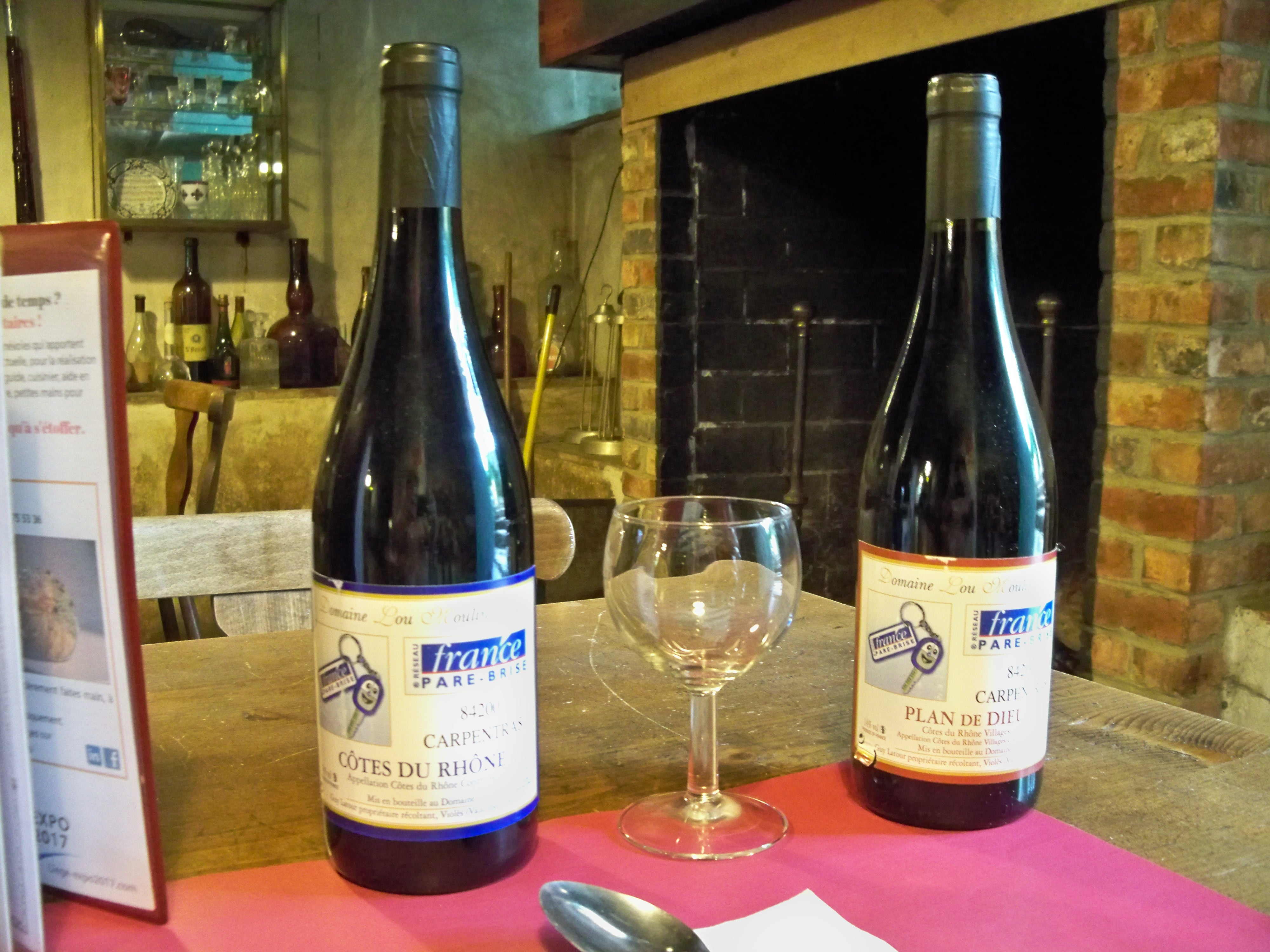 Une bouteille de Plan de Dieu et de Côtes du Rhône village à la Conférence sur le vin de la vallée du Rhône méridionale, à la ferme castrale d'Hermalle-sous-Huy.